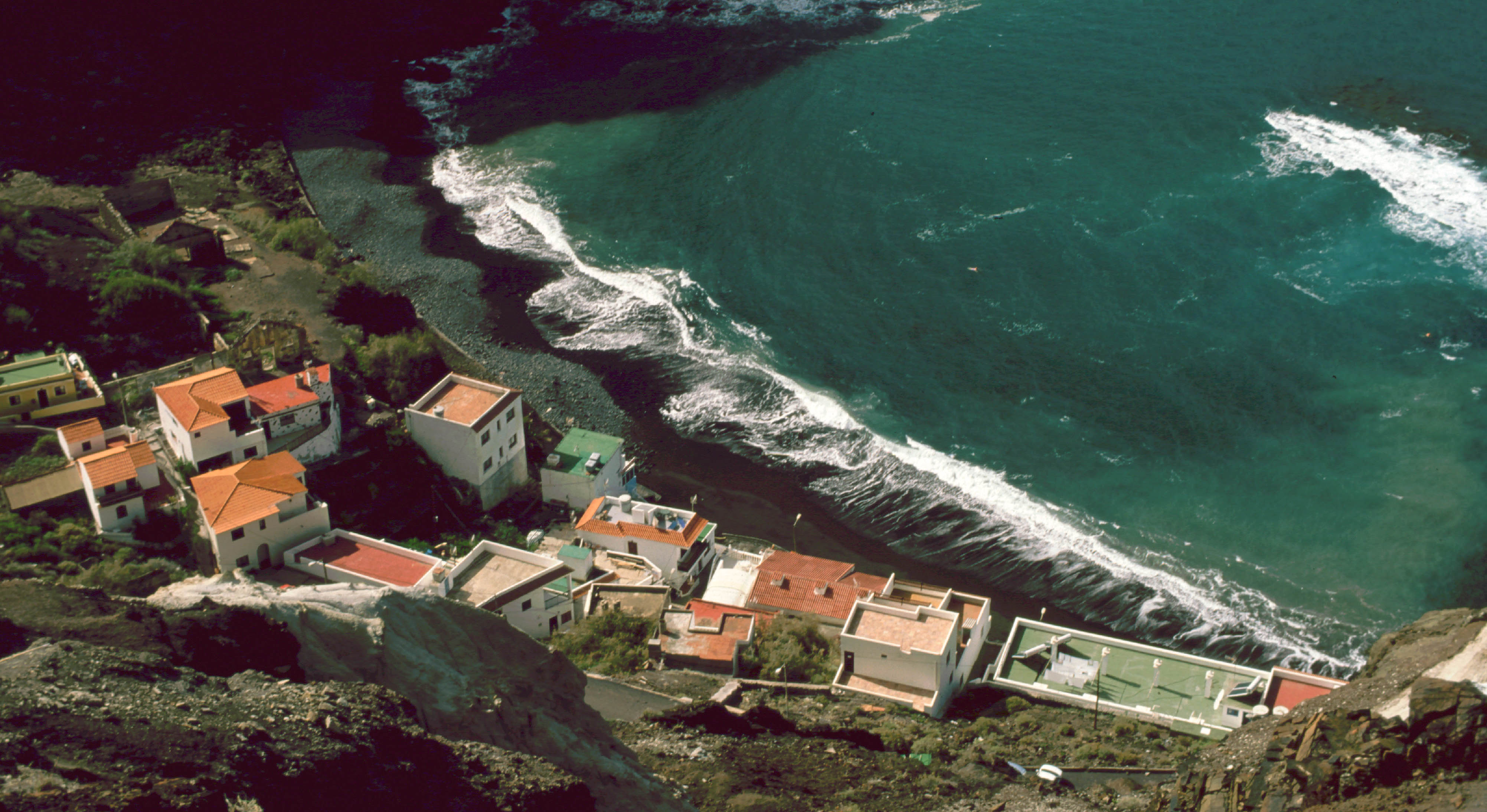 Playa de Alojera, Gomera, Spanien